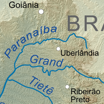 O Triângulo Mineiro como região natural, limitada pelos rios Paranaíba, a norte, e Grande, a sul, e, a este, pelo limite da bacia hidrográfica do rio Paraná.